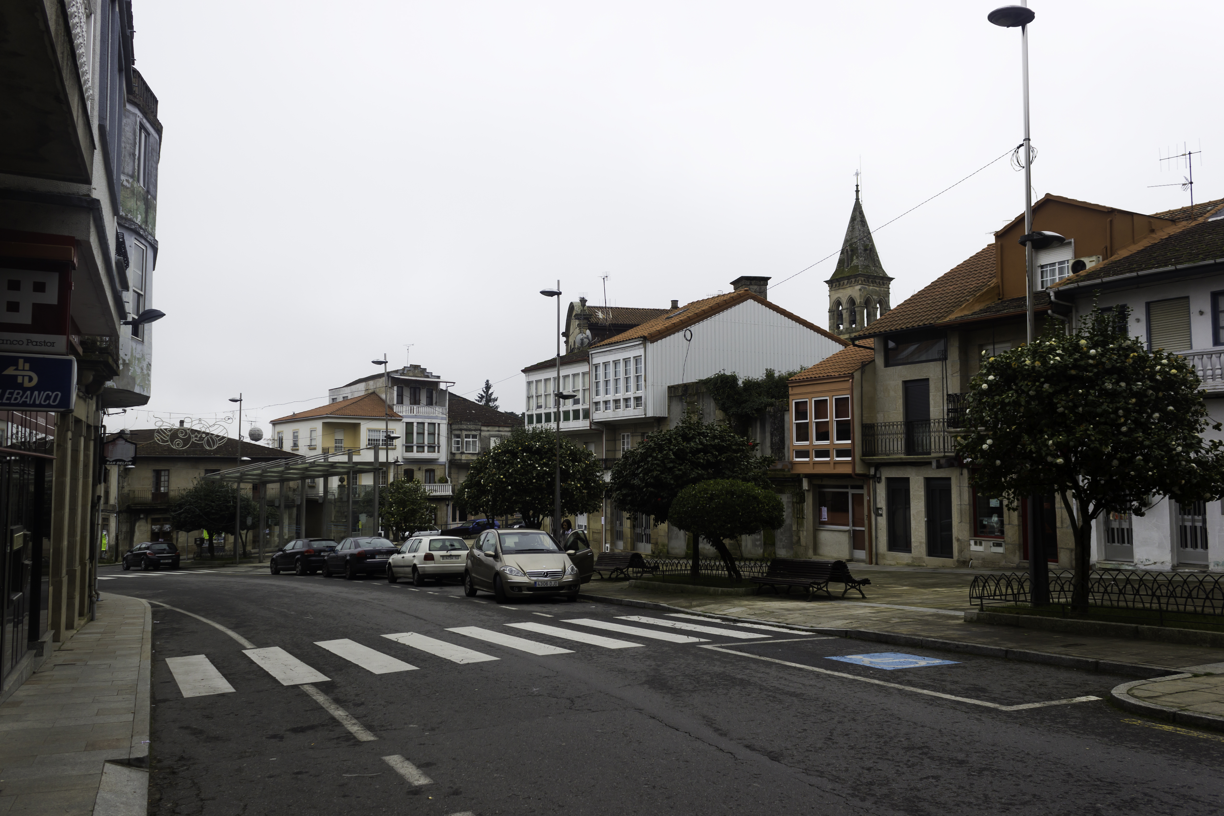 Rúa Principal, Maside.